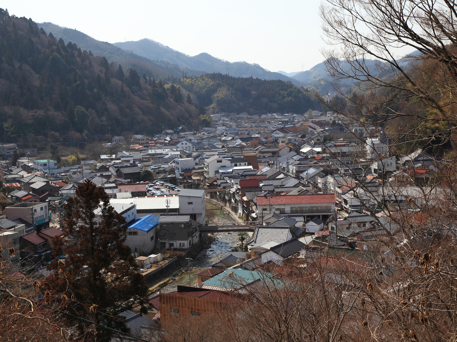 観音山からの足助市街地の眺め（豊田市足助町、2012年）